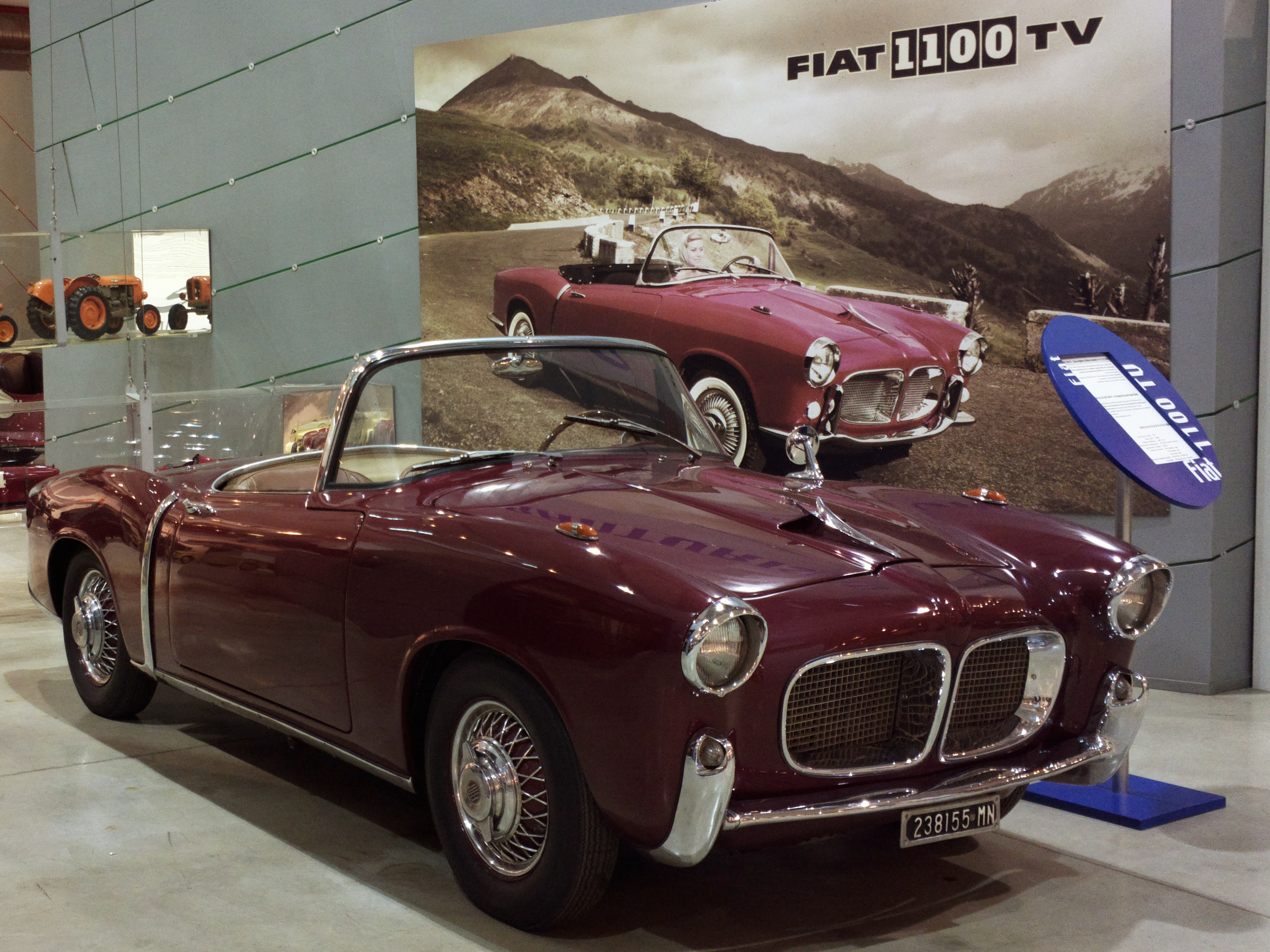 Fiat 1100TV al Centro Storico Fiat